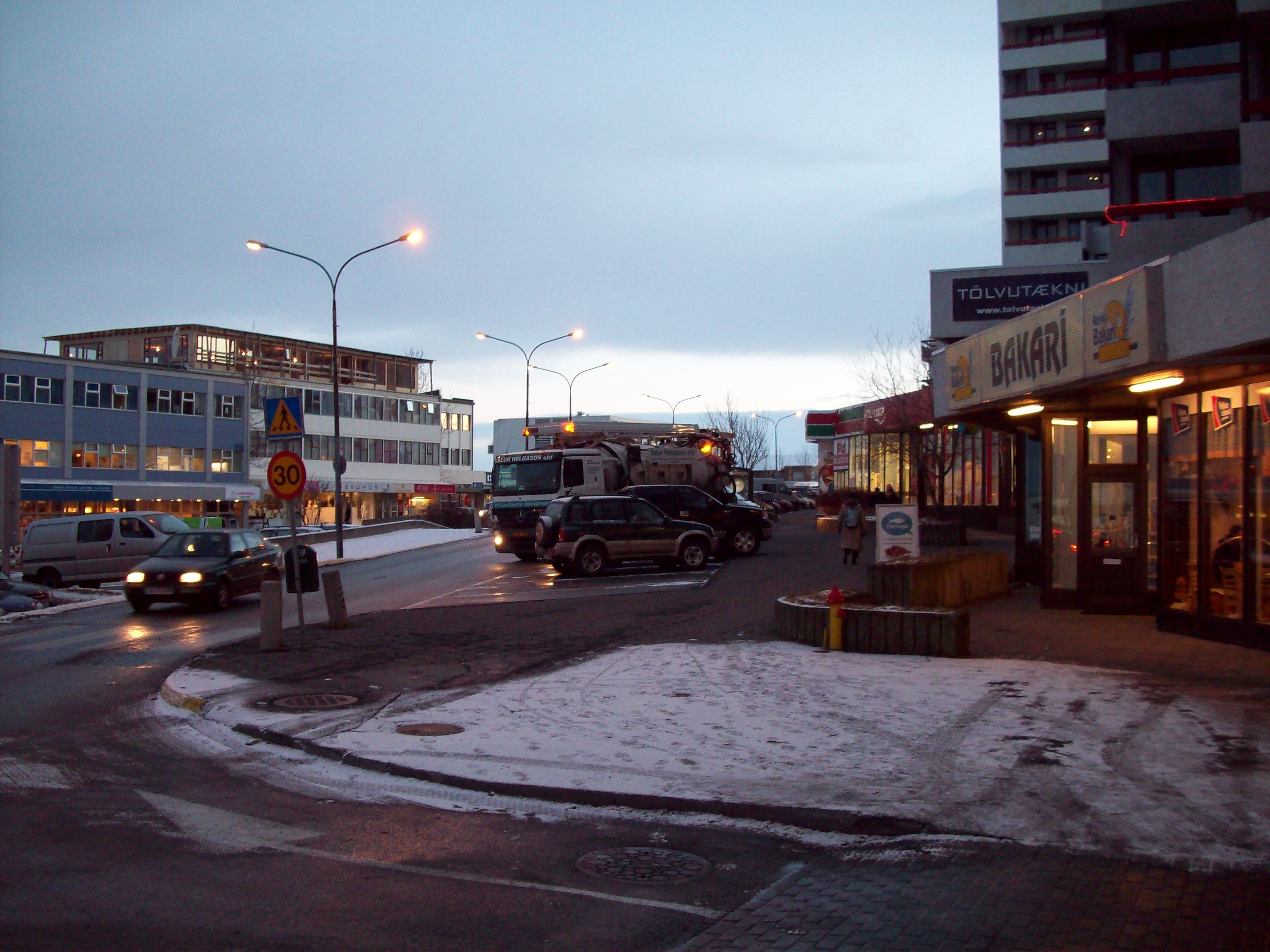 Hamraborgin í Kópavogi